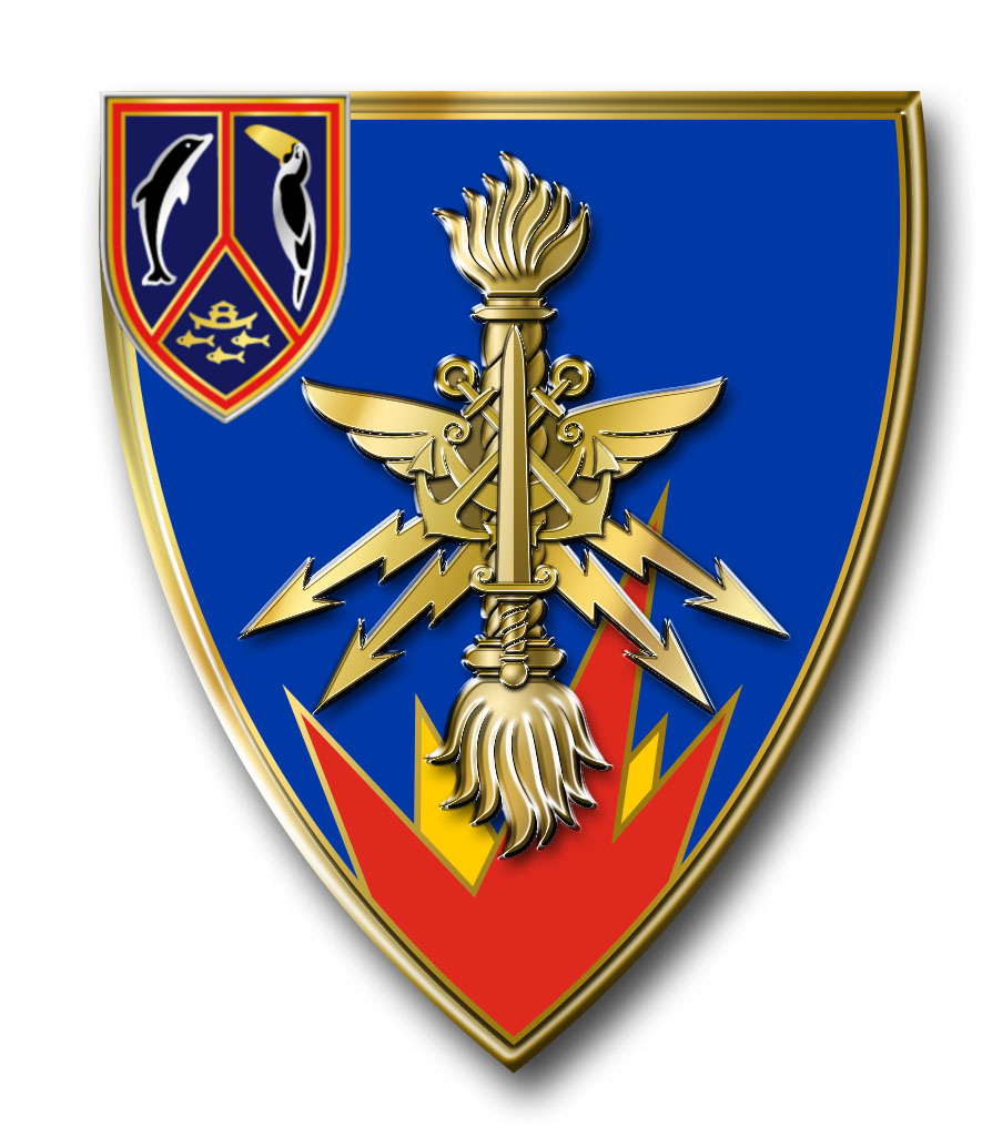 Insigne GMu de Guyane